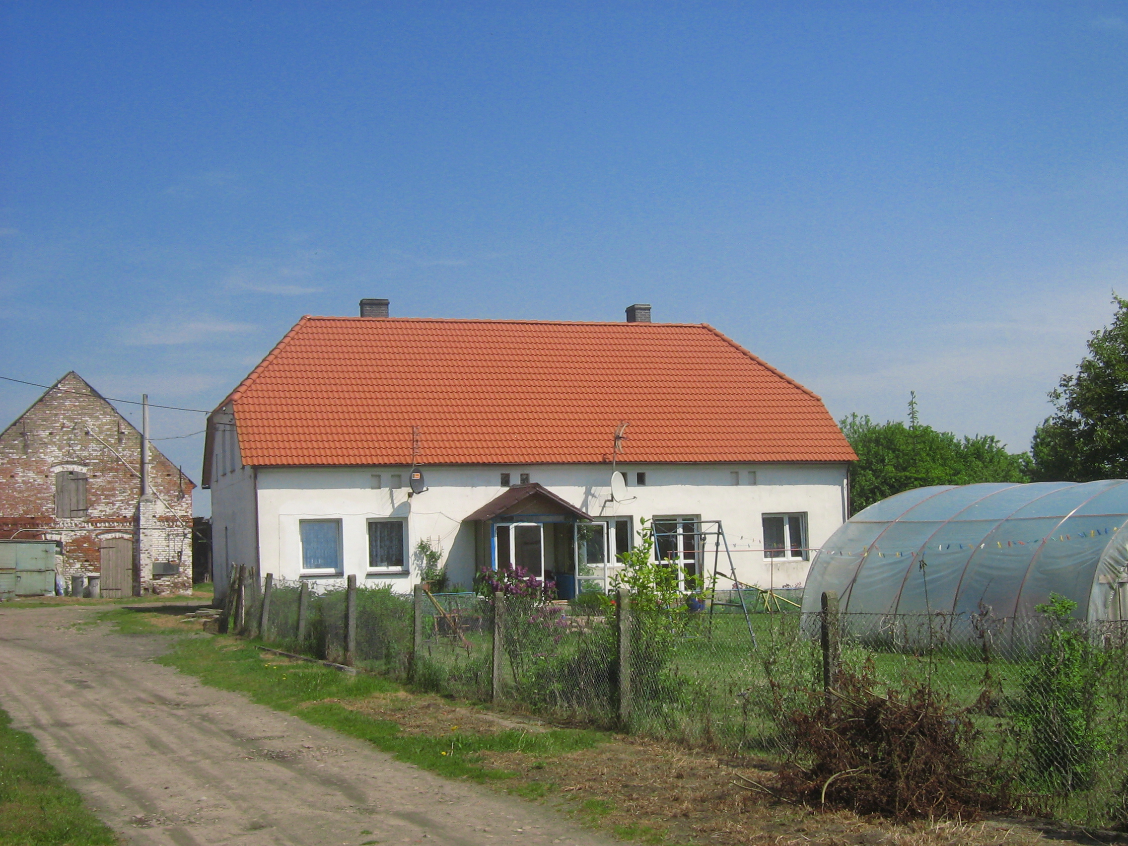 Zabytkowy dom w Sibinie